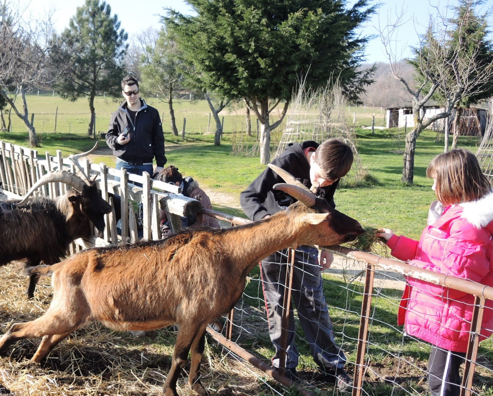 Peaugres détail